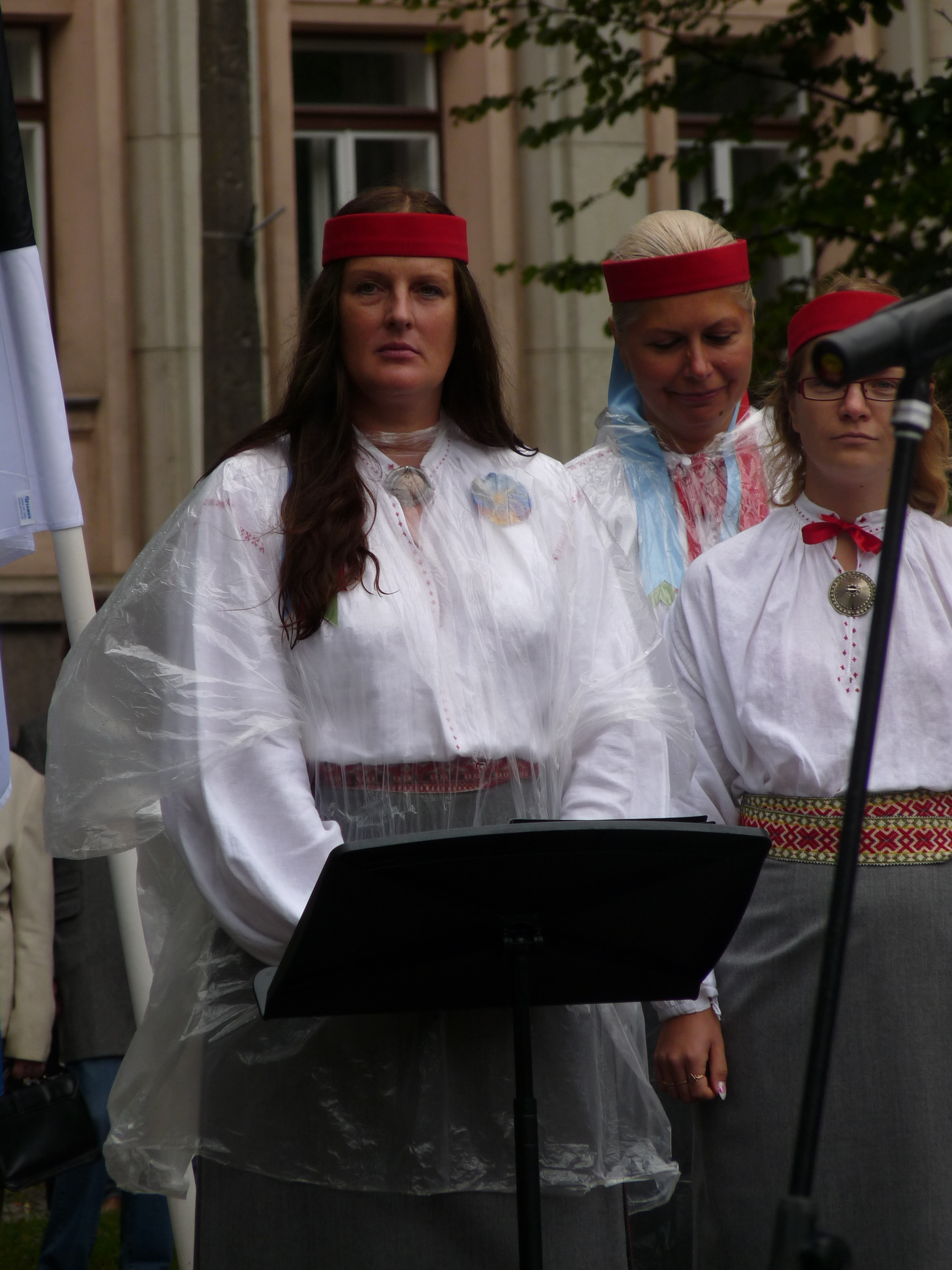 Naiskoori Emajõe Laulikud dirigent Vilve Maide Eesti taasiseseisvumispäeva tähistamisel Tartu vabadussamba juures, 20. august 2012